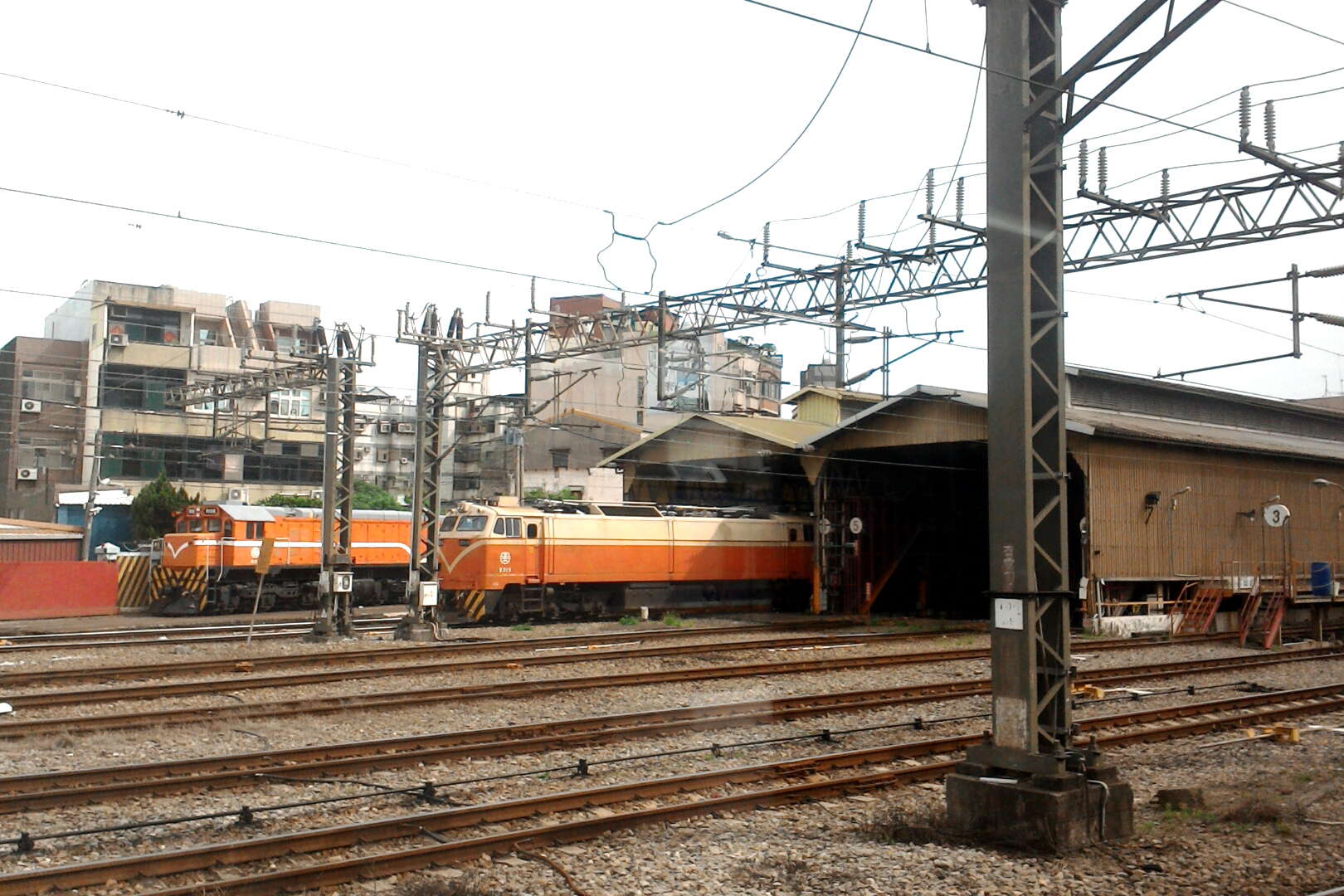 臺灣鐵路管理局新竹車站車庫，內有柴電機車R154與電力機車E315。